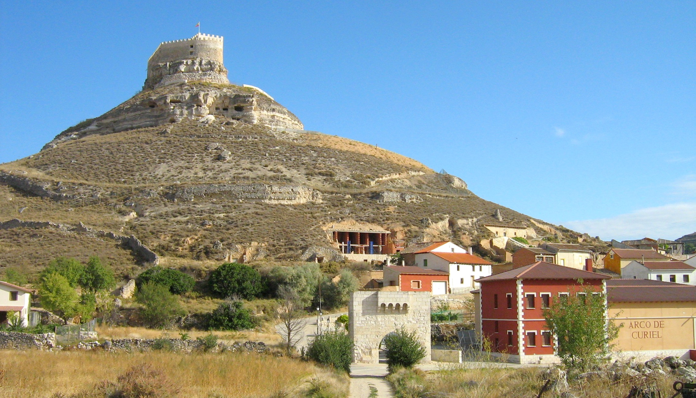 Curiel de Duero. Castillo. Arco. Bodega. Valle del Cuco. Valladolid